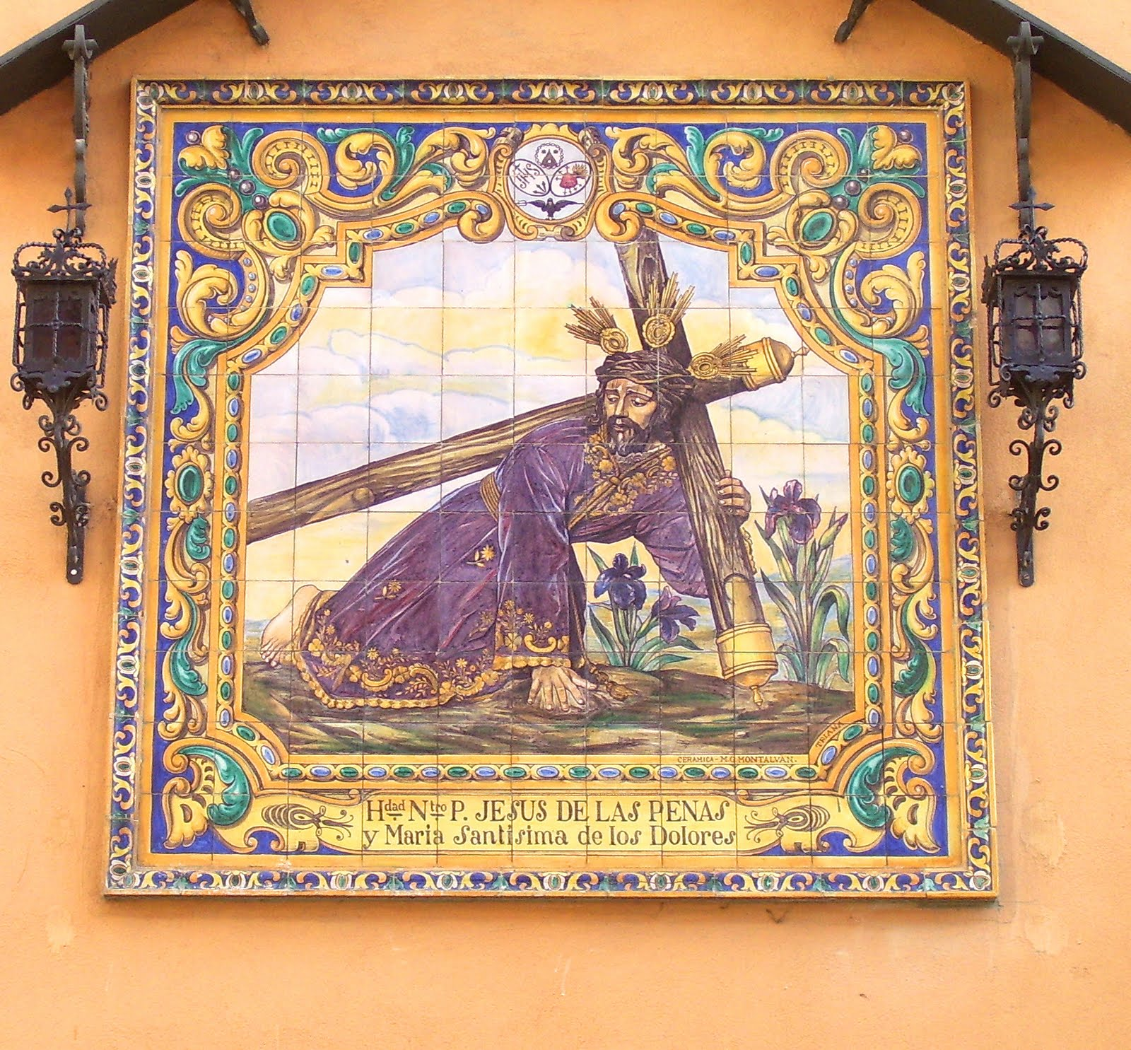 Azulejo del Cristo de las Penas de San Vincente. Manuel García-Montalván, 1927. Iglesia de San Vicente. Sevilla, Andalucía, España.